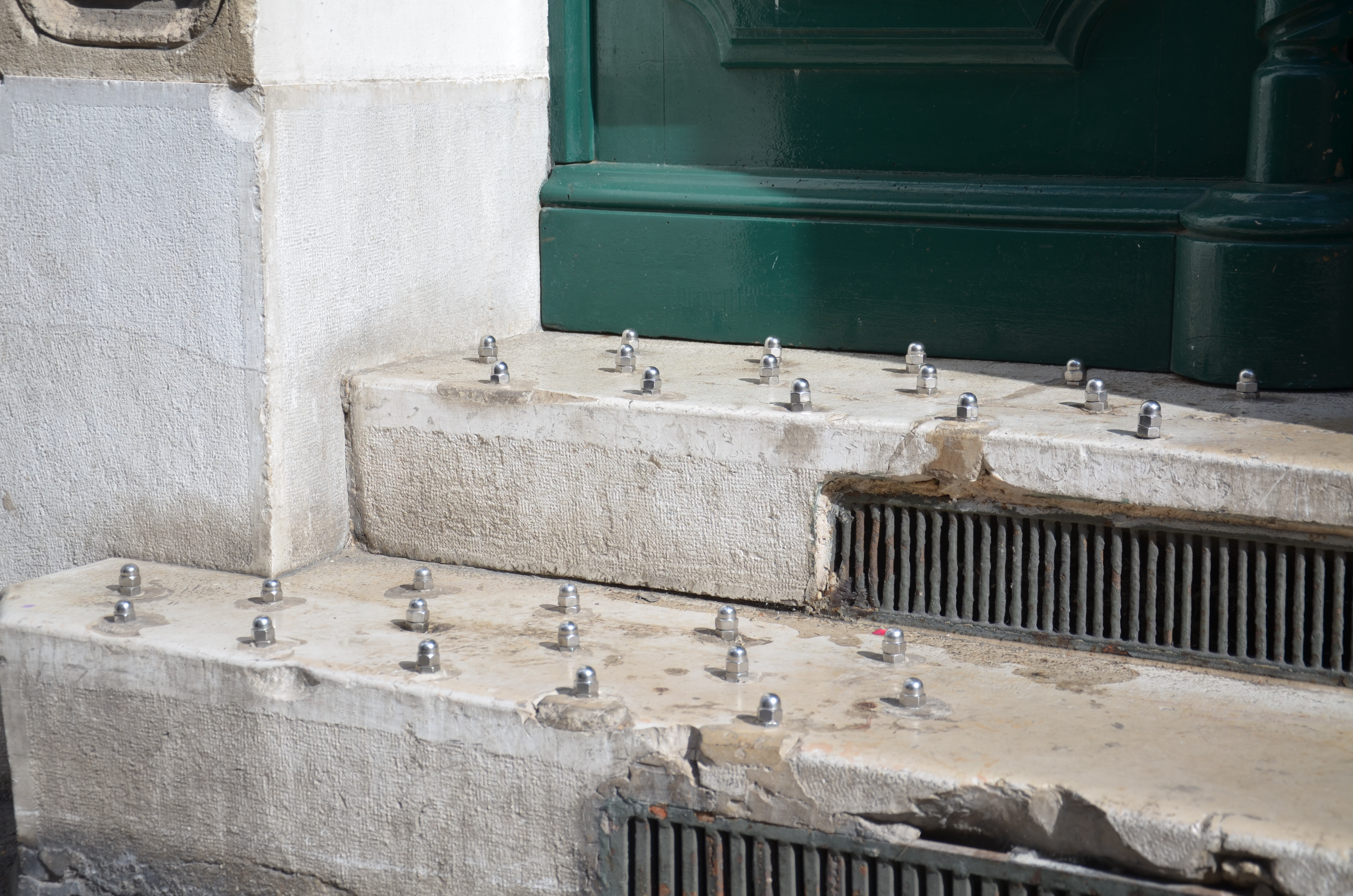 Dispositif anti-SDF installé sur le perron d'un immeuble du sixième arrondissement de Marseille. Les boulons vissés dans la pierre dissuadent toute personne de s'installer devant la porte qui reste close la plupart du temps. Grilles de ventilation intégrées dans les contre-marches.